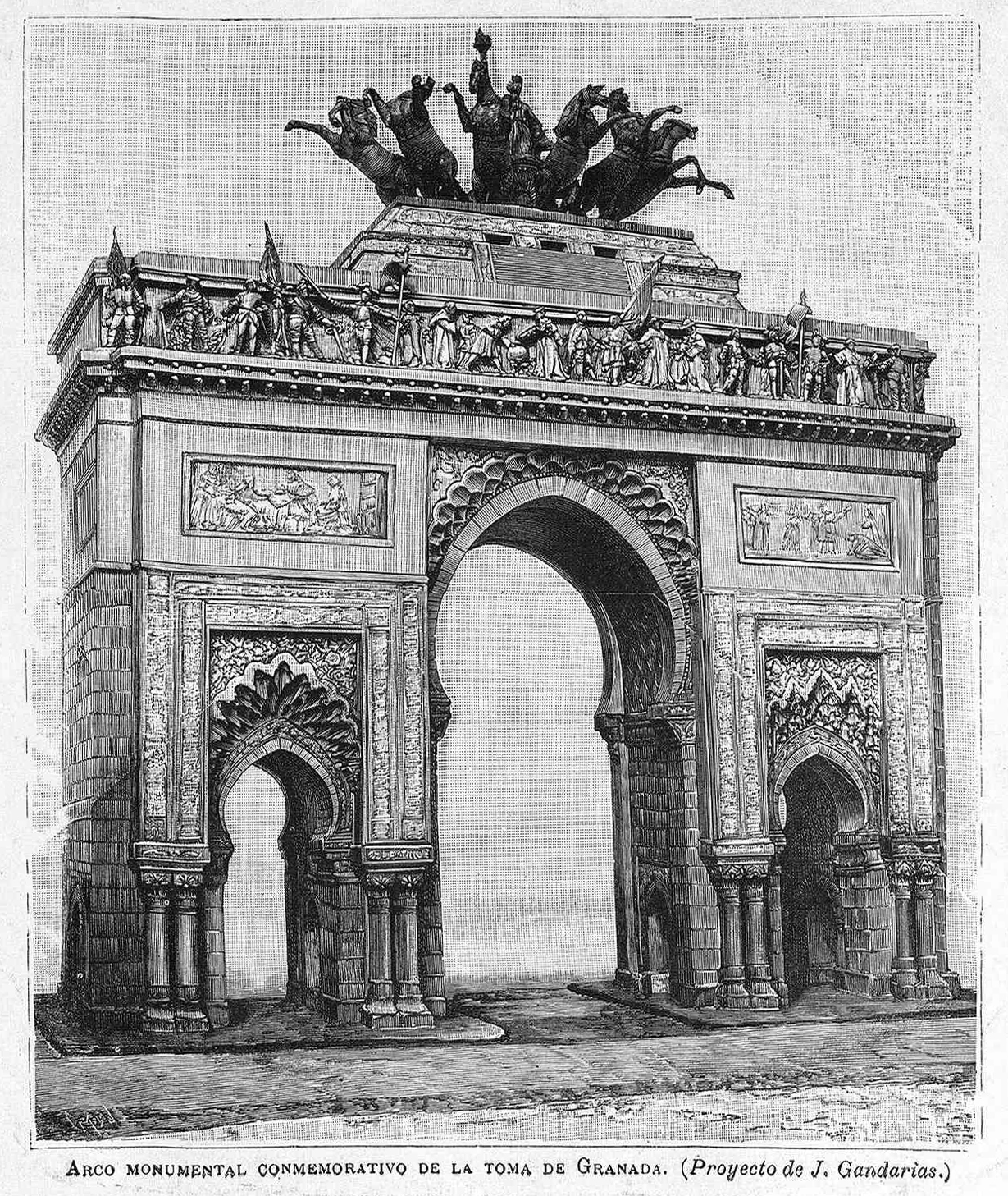 Arco monumental conmemorativo de la toma de Granada (proyecto de J. Gandarias).